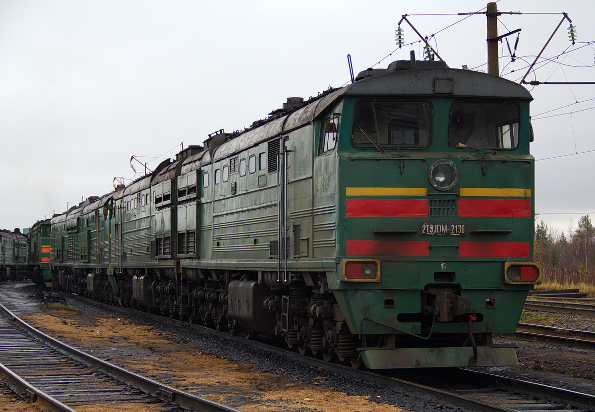 В 1990-х приписка ТЧ Палласовка В 2000-х передан в ТЧ-1 Астрахань-II 10.2008 г. КР Уссурийский ЛРЗ 07.2014 г. СР СЛД Сольвычегодск